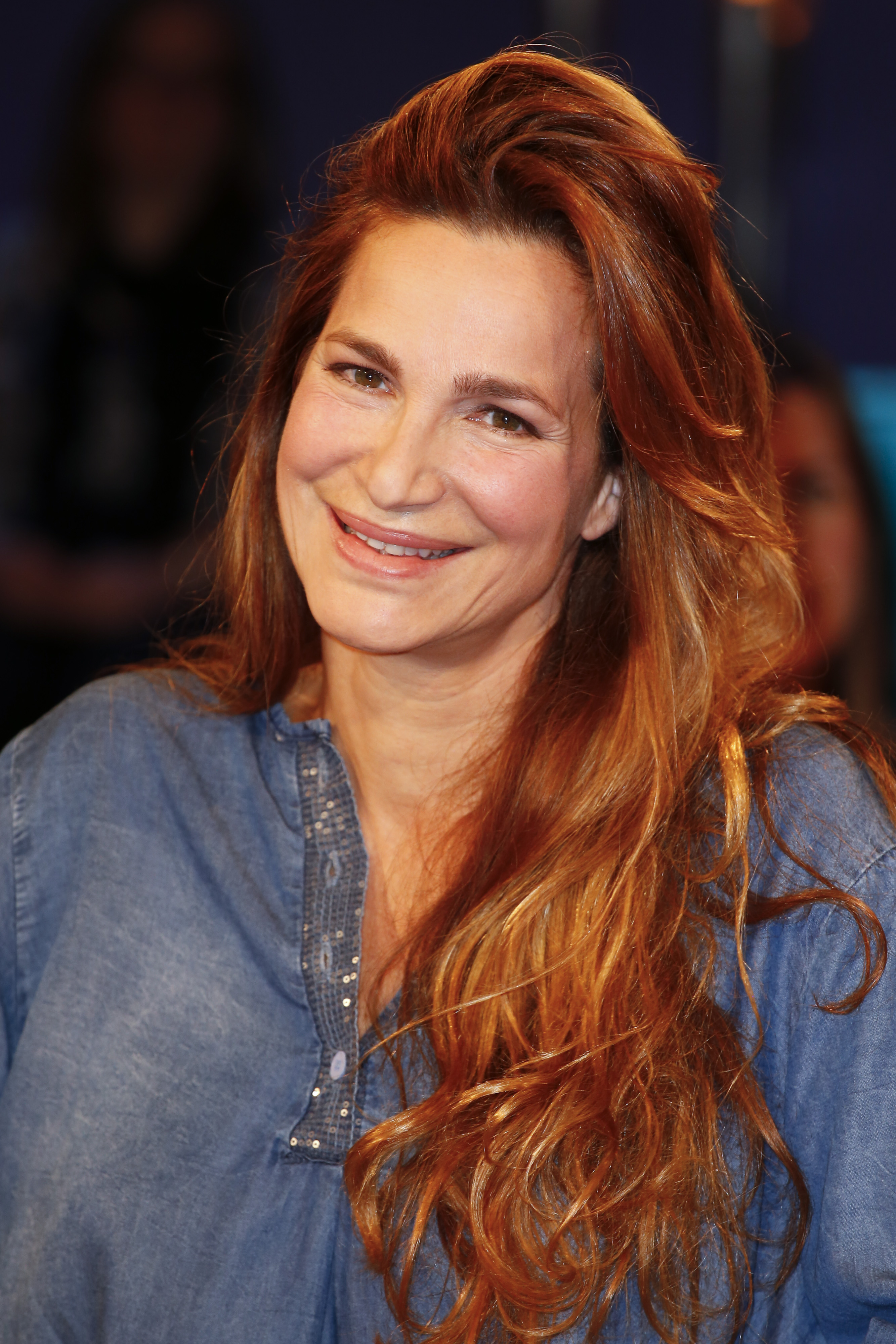 Alexandra Kamp bei der NDR Talk Show am 03.06.2016 Foto; Jan-Timo Schaube